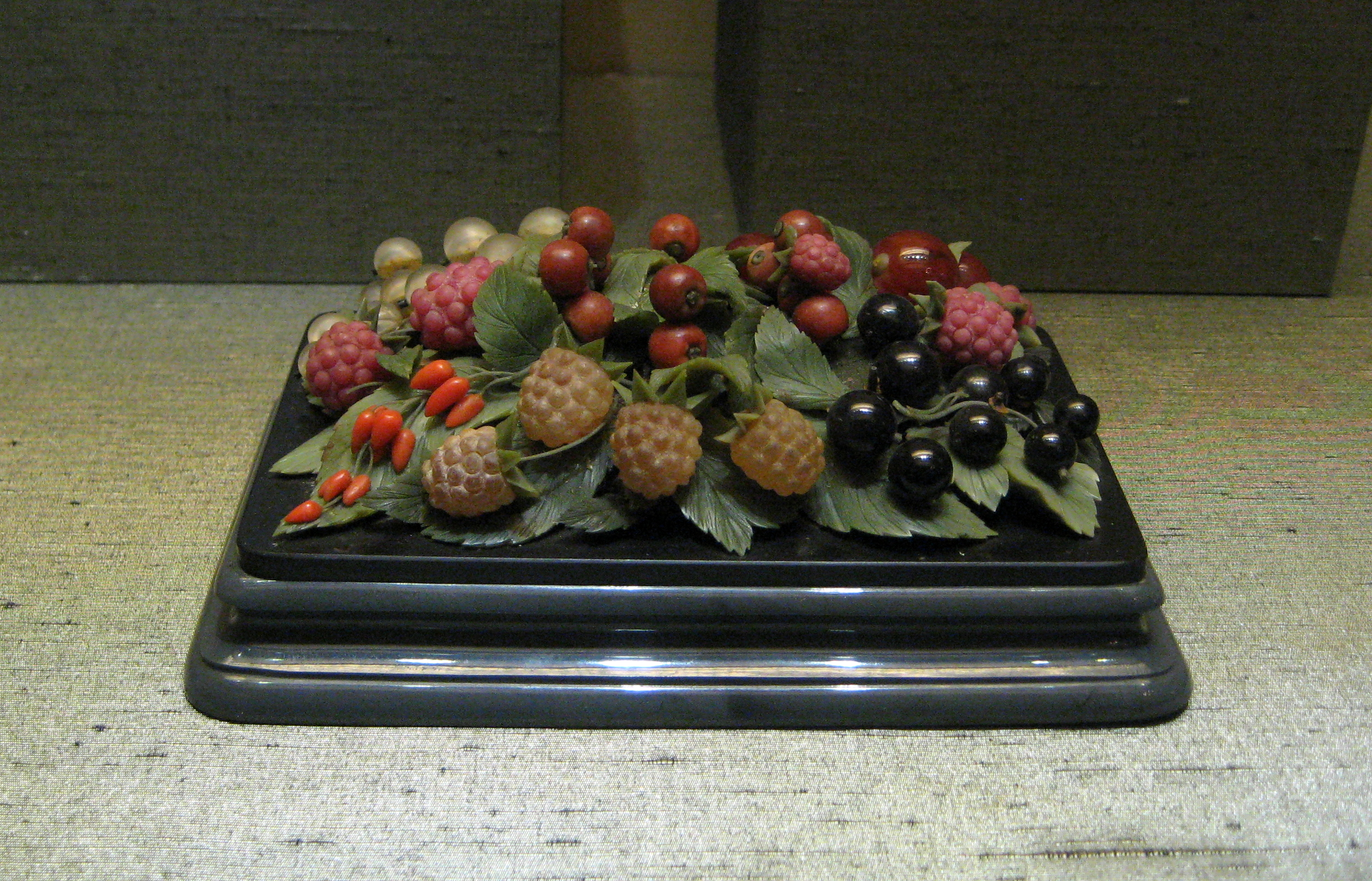 Stone berries paperweight. Екатеринбург. До 1860. Яшма, змеевик, горный хрусталь, сердолик, гипс-селенит, мрамор, гагат, коралл. Получено в дар от А.Н. Куприянова в 1959 году. Музей Ферсмана.